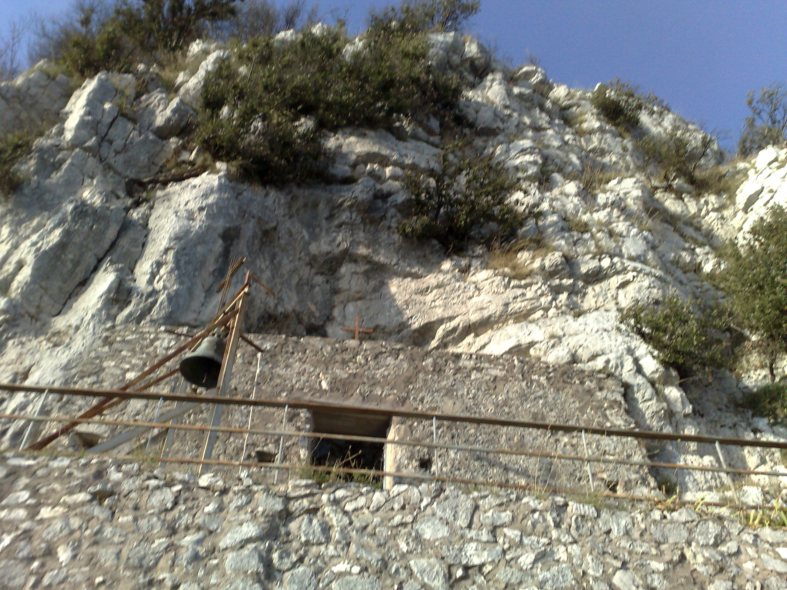 La grotta scavata dai Longobardi nel 663 a. C. Oggi è riparata da un muro ,mentre all'esterno troviamo una campana,la "campana di Preturo"